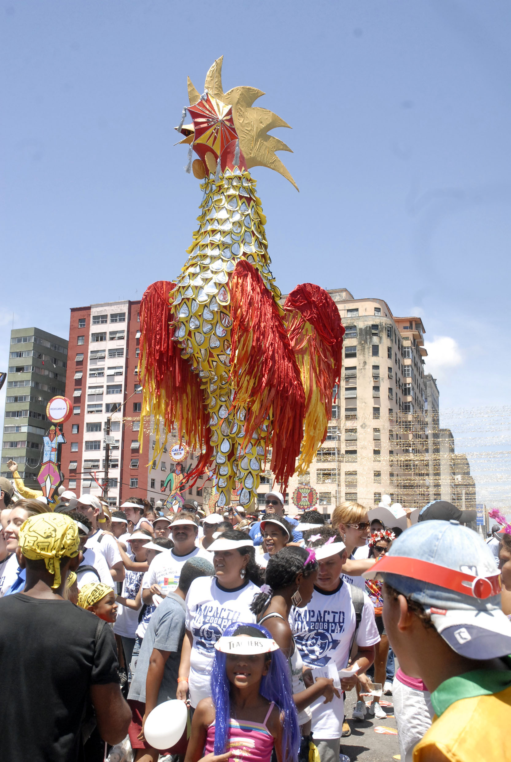 Galo da madrugada, Carnaval do Recife, Pernambuco, Brazil